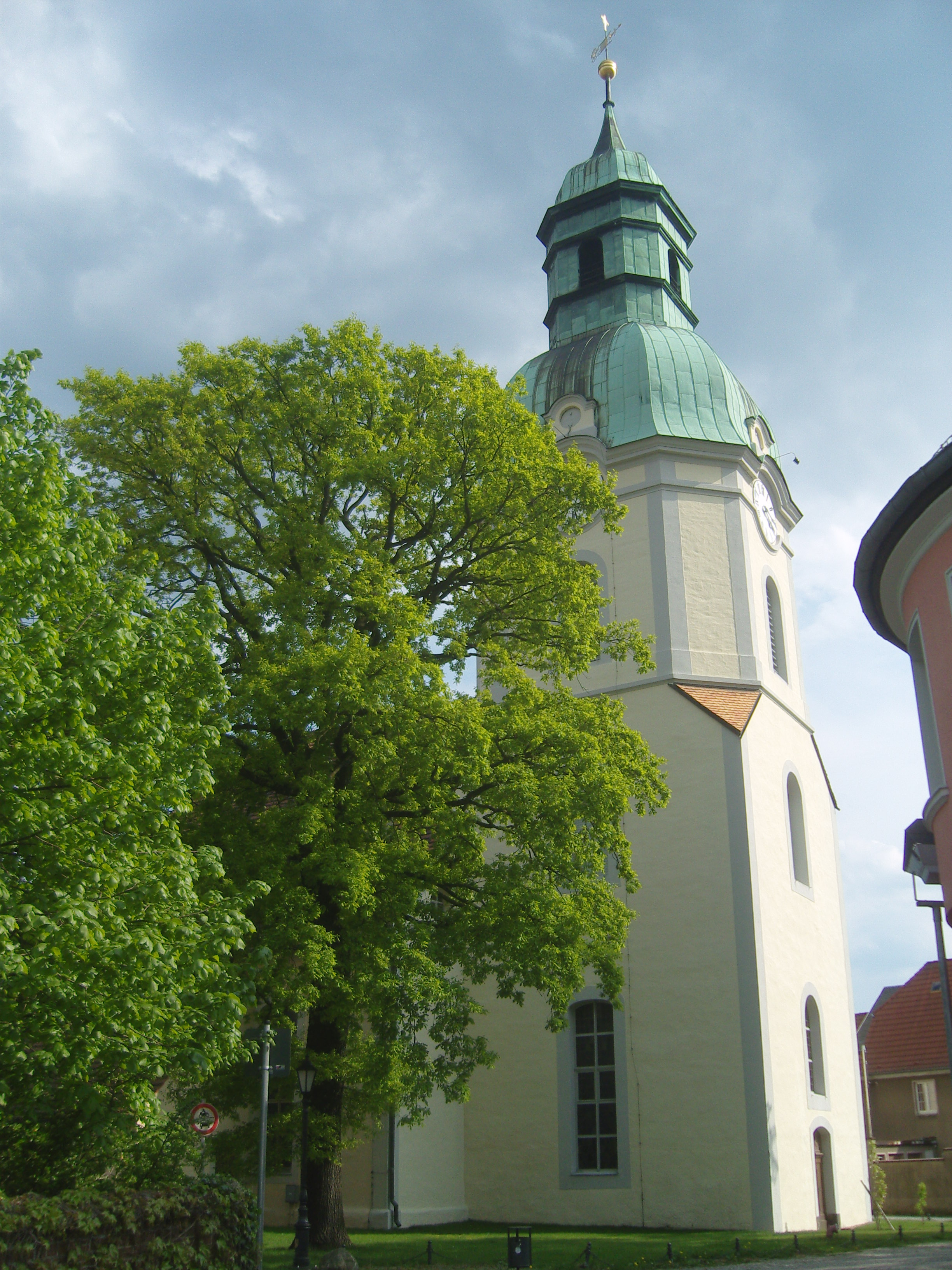 Denkmalgeschützte evangelische Kirche in Ruhland, Kirchplatz; links ehemalige Bismarck-Eiche, gepflanzt 1895